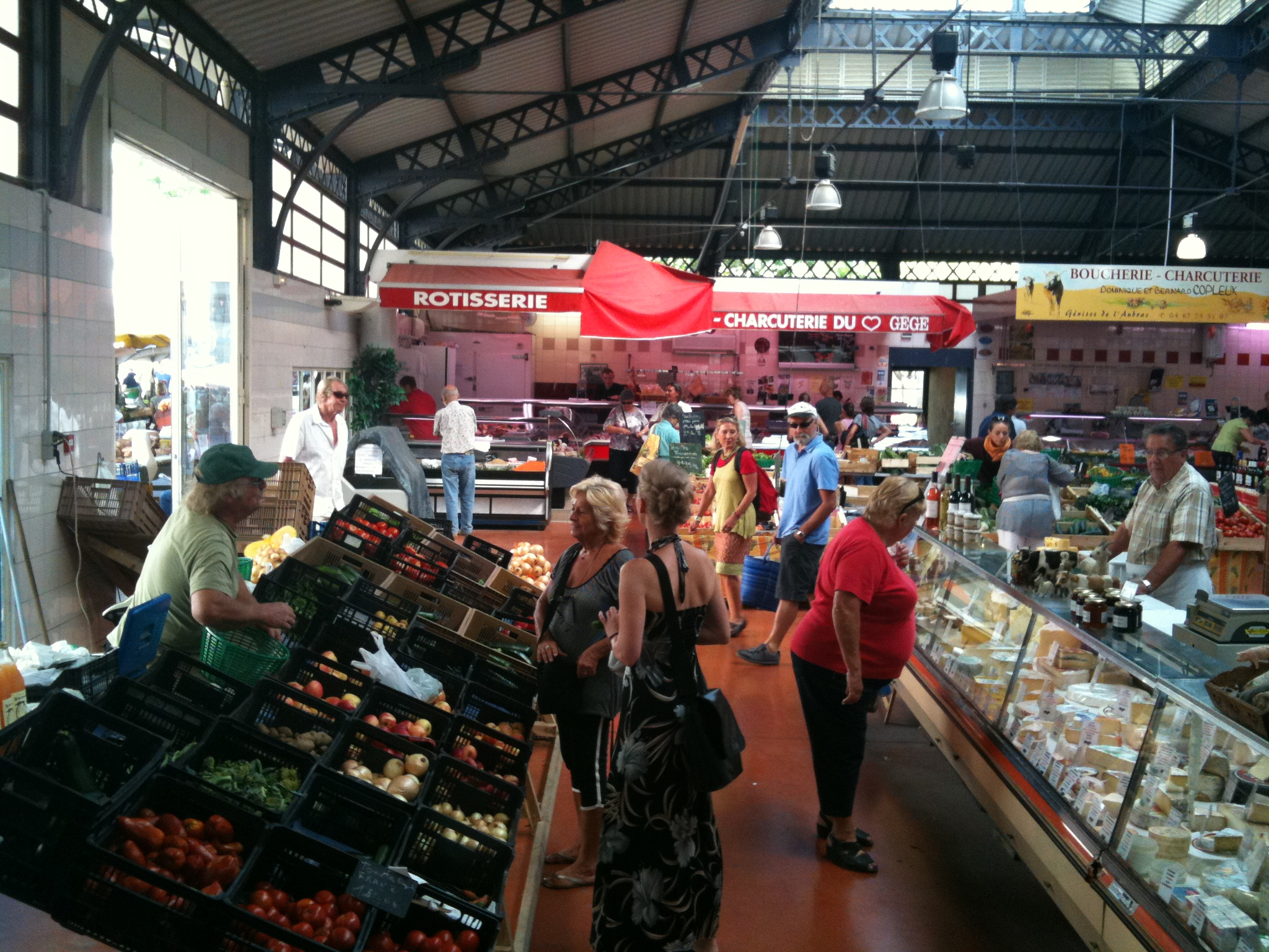 Die 1906 erbaute Markthalle in Ganges (Fr, Herault) beim Markt am 16.09.2011 innen.